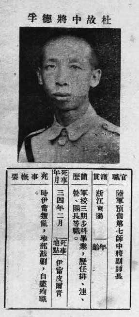 中文（台灣）: 抗戰軍人忠烈錄第一輯中的烈士遺像